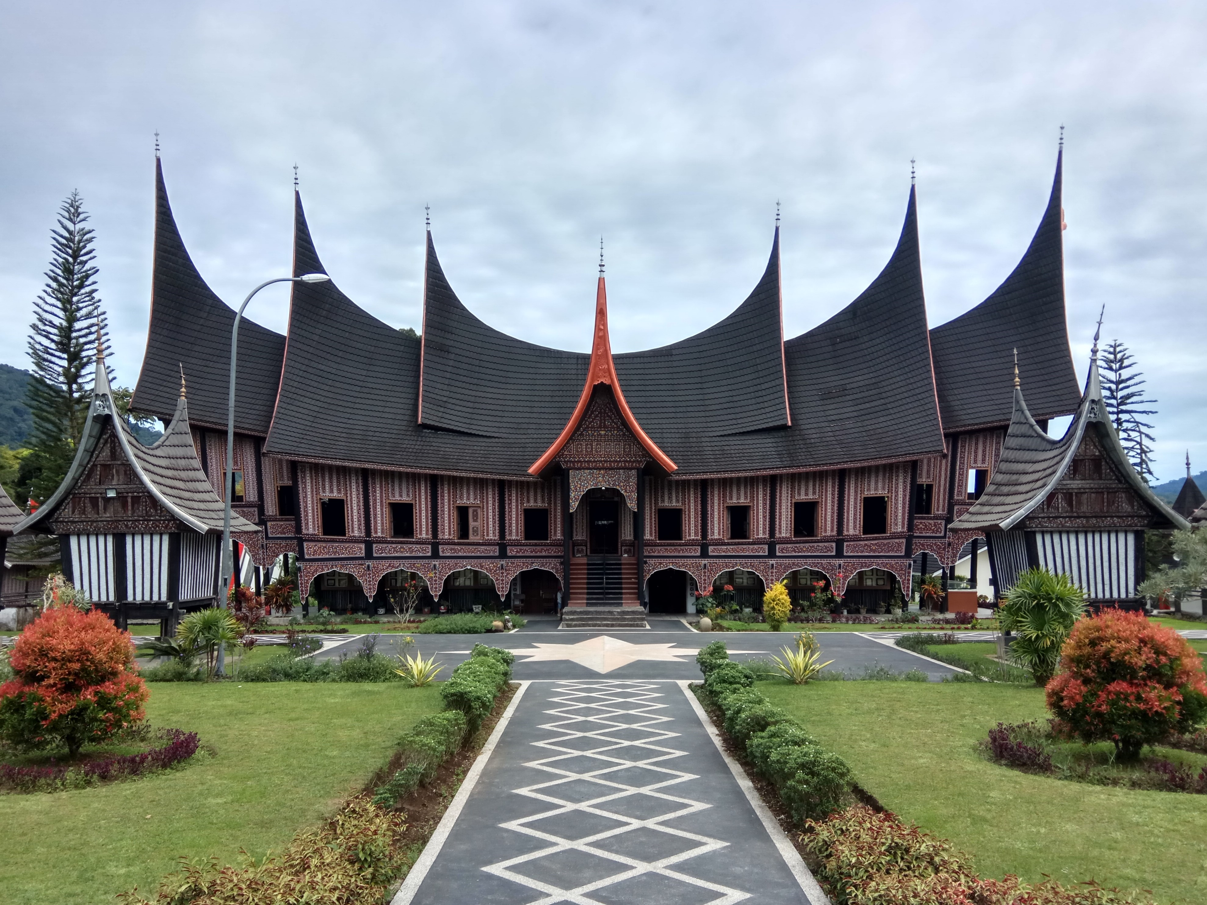 PDIKM saat dipotret digitalisasi